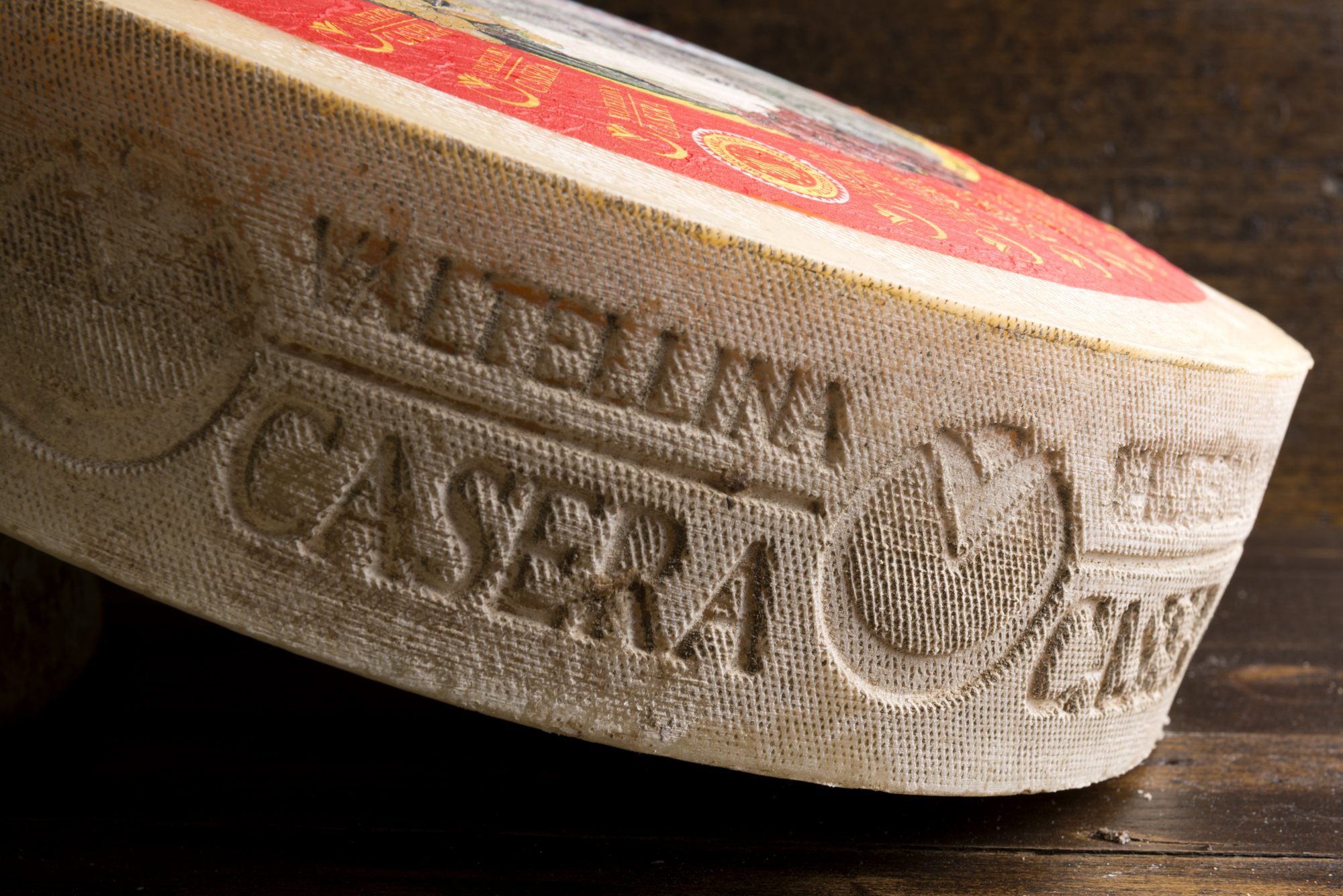 Valtellina Casera DOP